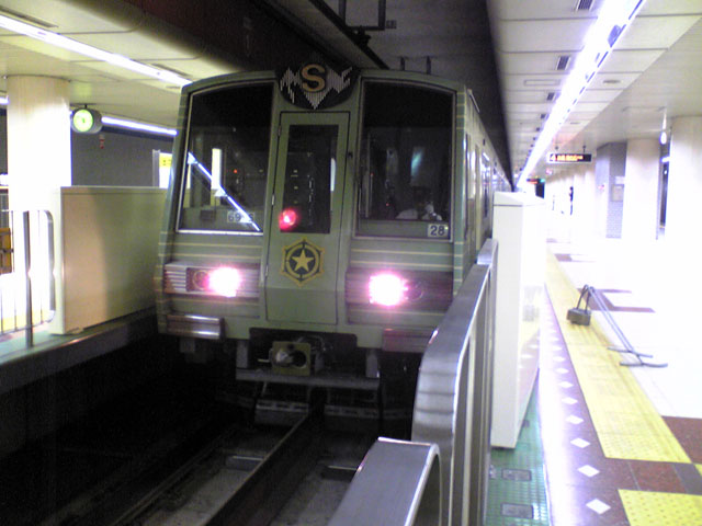 ホームドア設置後、初にして唯一6000形の始発運用（28列車）